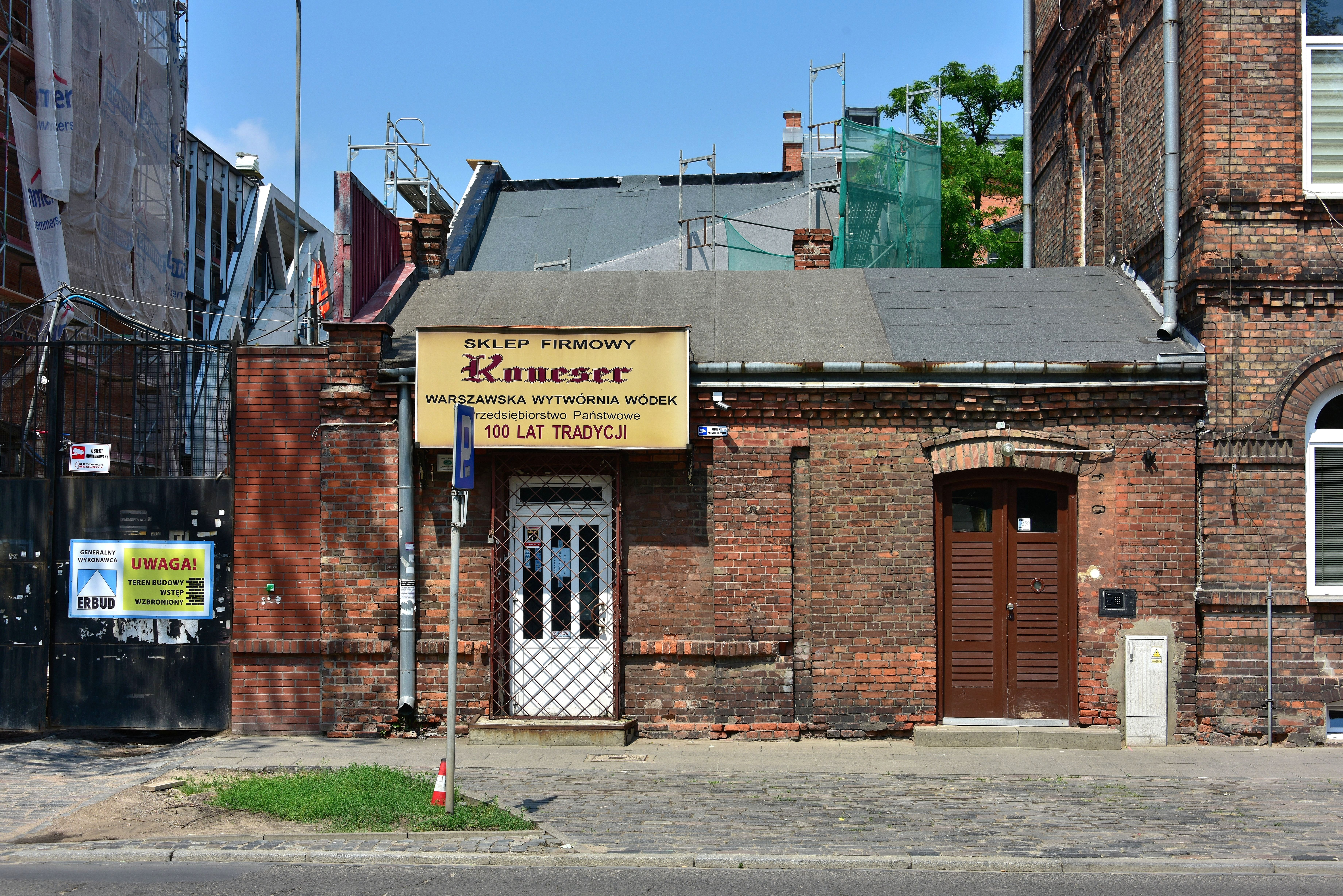 Nieistniejący sklep firmowy "Konesera" przy ul. Ząbkowskiej w Warszawie